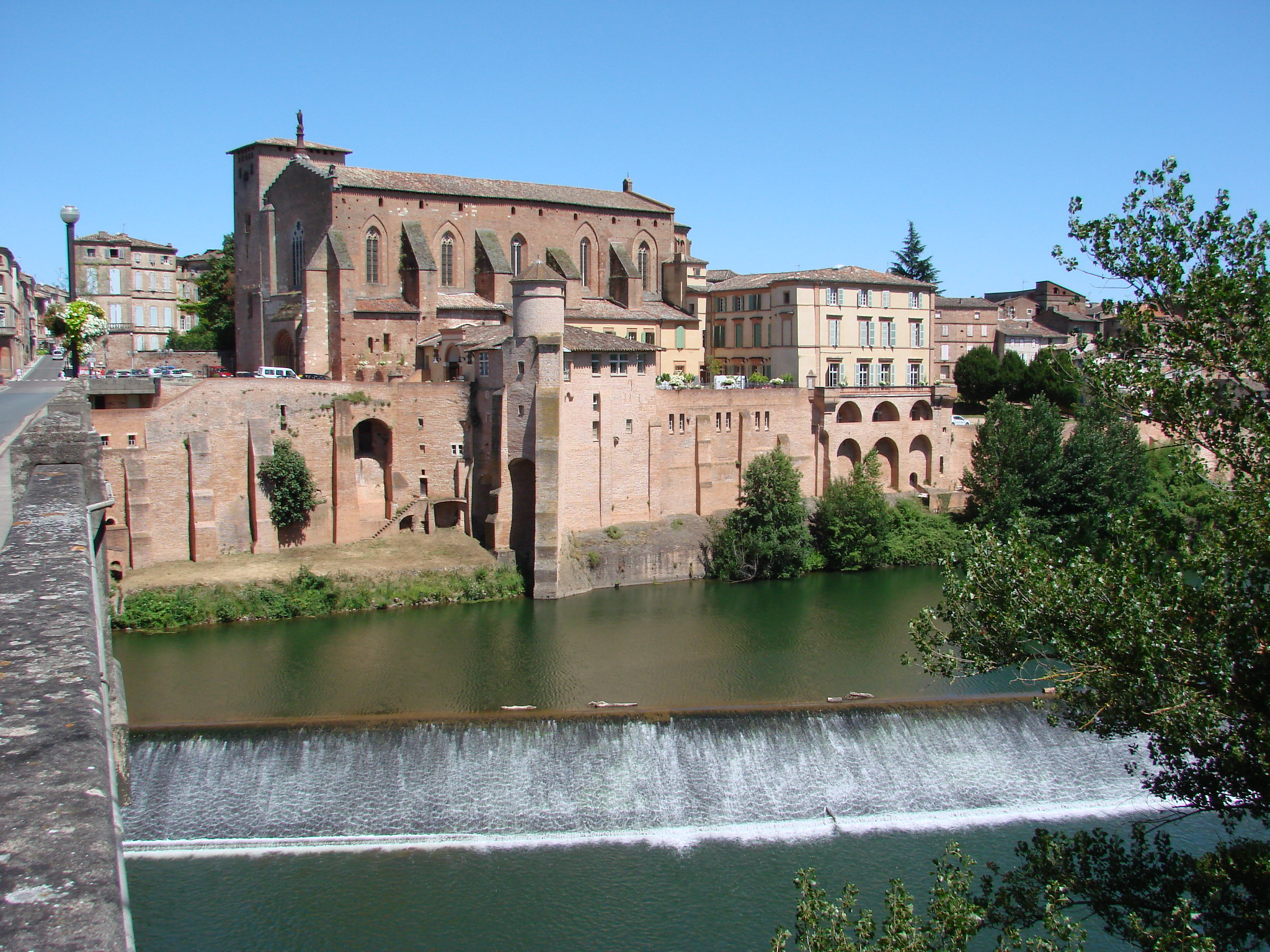 abbaye saint michel de gaillac